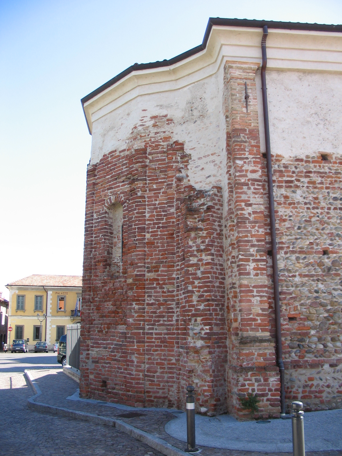 Basilica Autarena di Fara Gera d'Adda, nel comune di Fara Gera d'Adda.